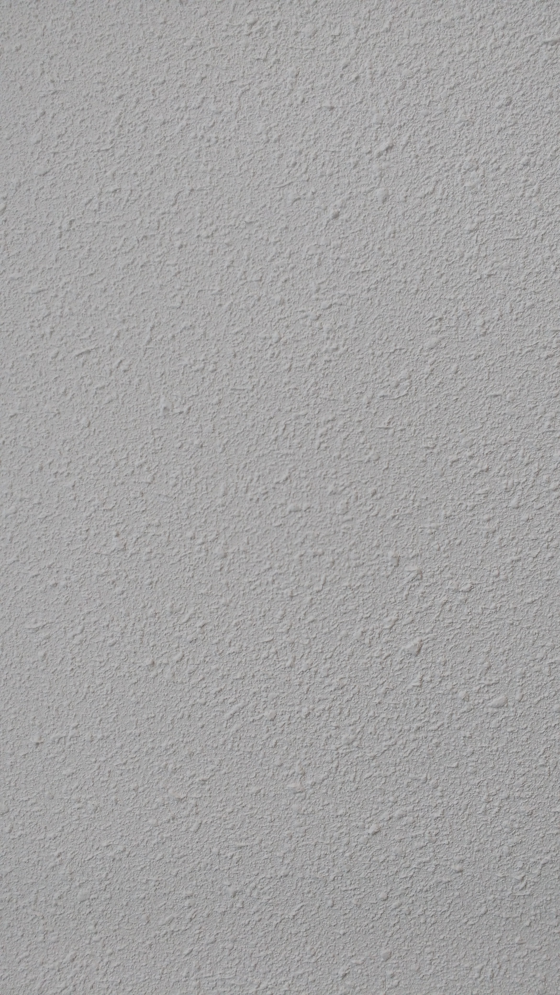 witte Spachtelputz, op de muur bij mijn tandarts